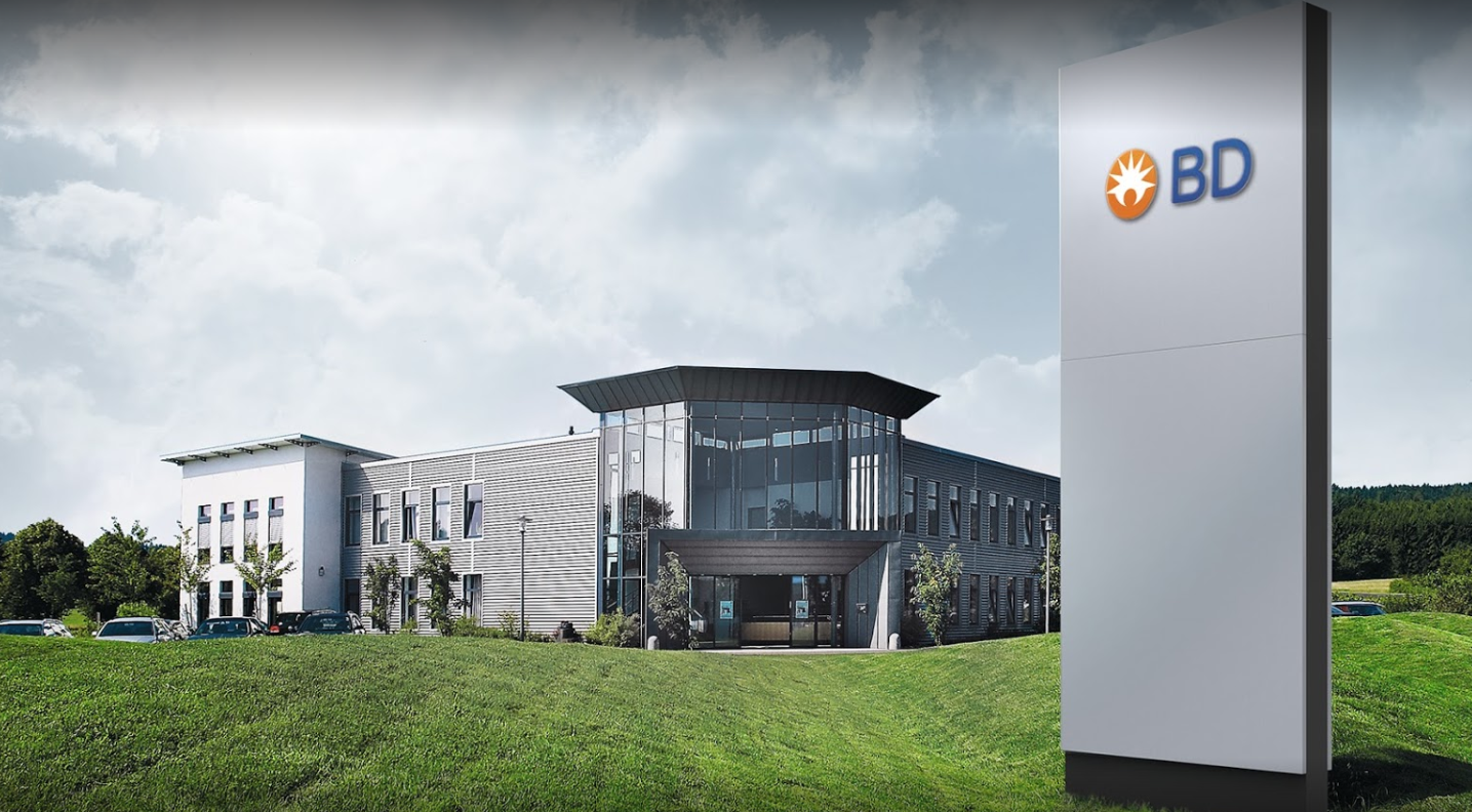 Standort Rowa Technologies in Kelberg mit BD Firmenschild.